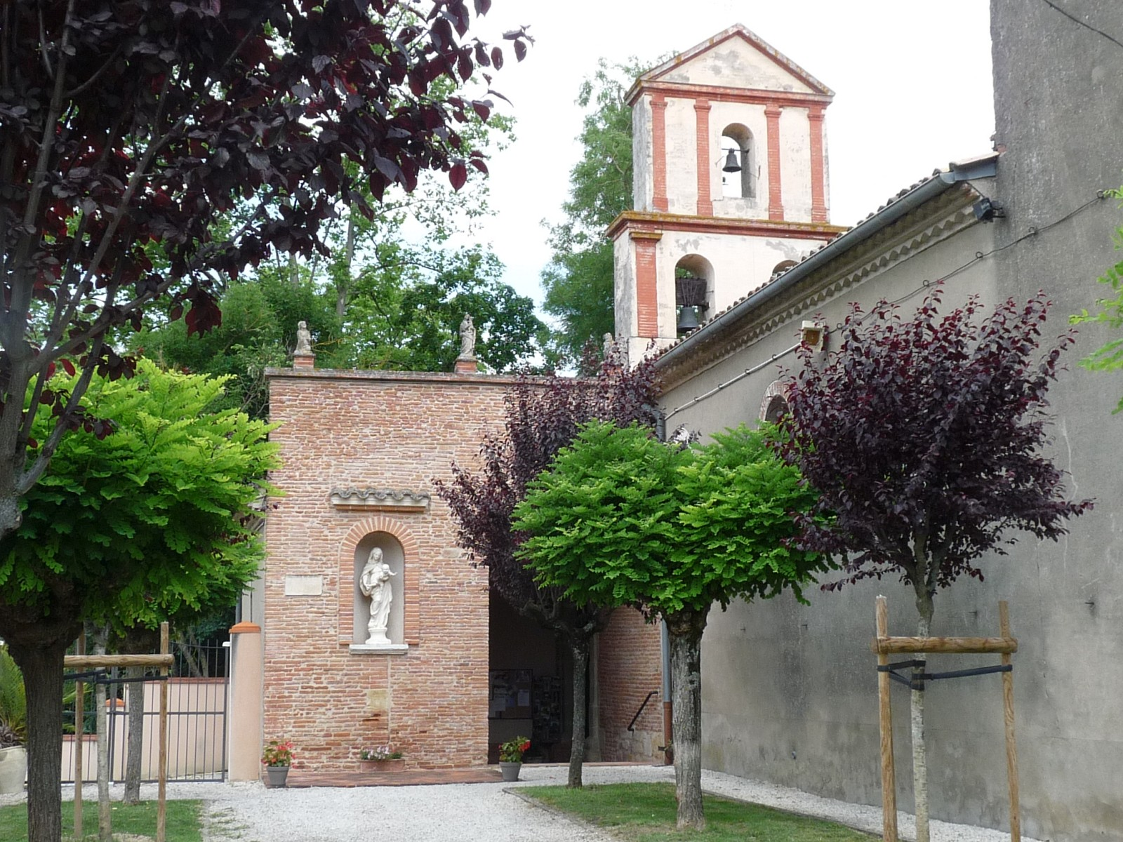 Eglise de Saussens, Haute-Garonne, France